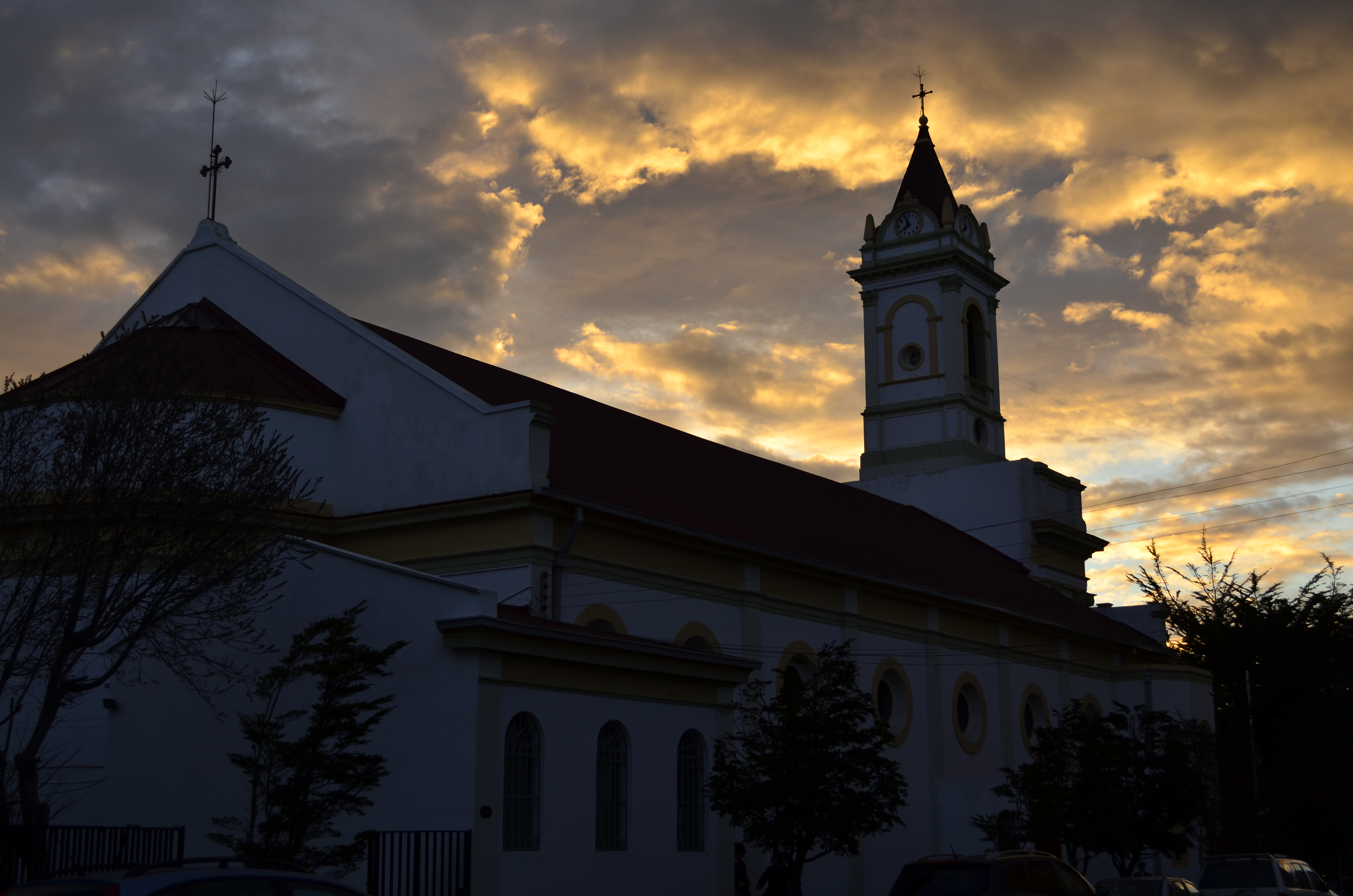 Plaza Muñoz Gamero y edificios que la acotan This is a photo of a national monument in Chile: 191